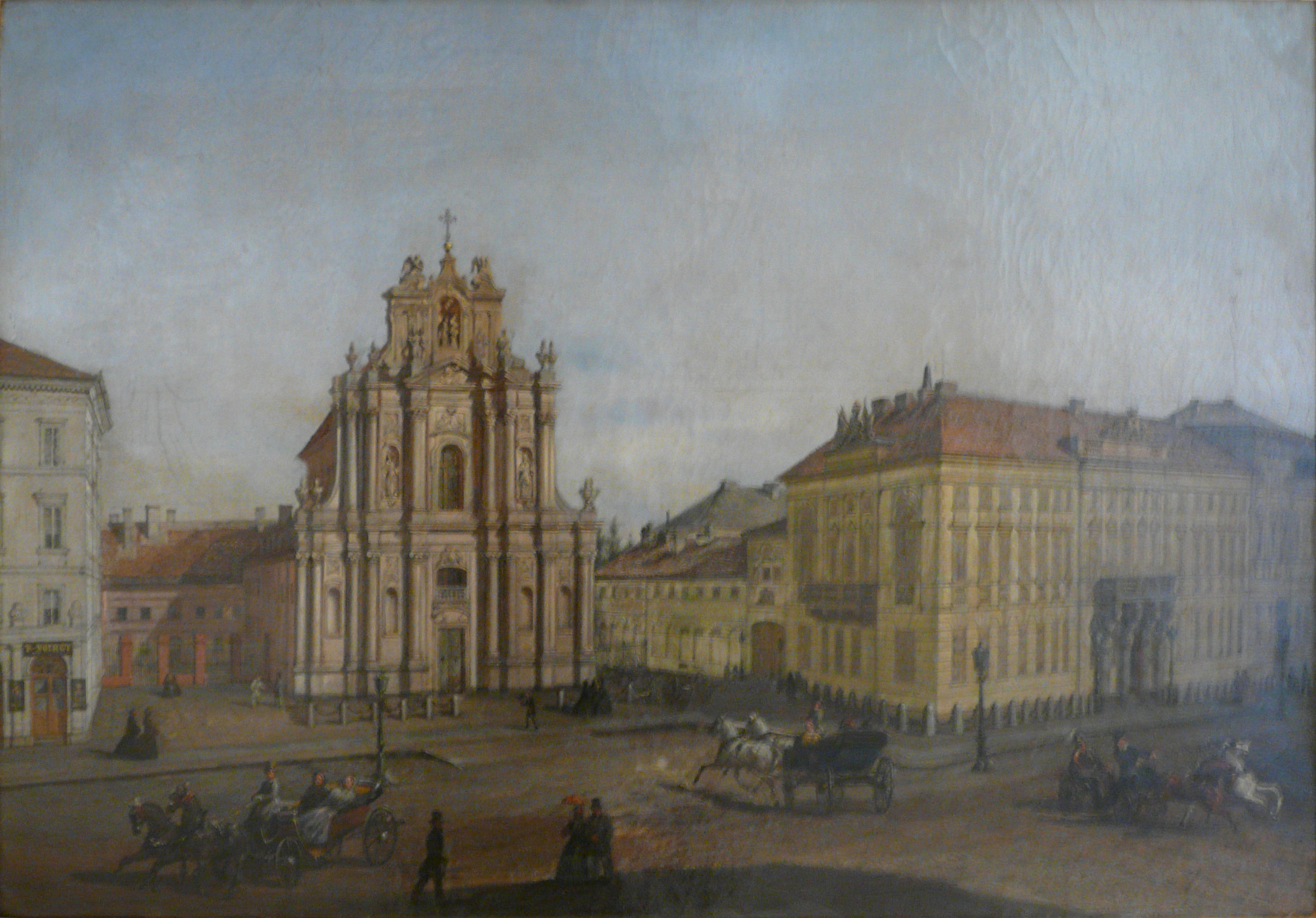 Tyszkiewicz Palace in Warsaw